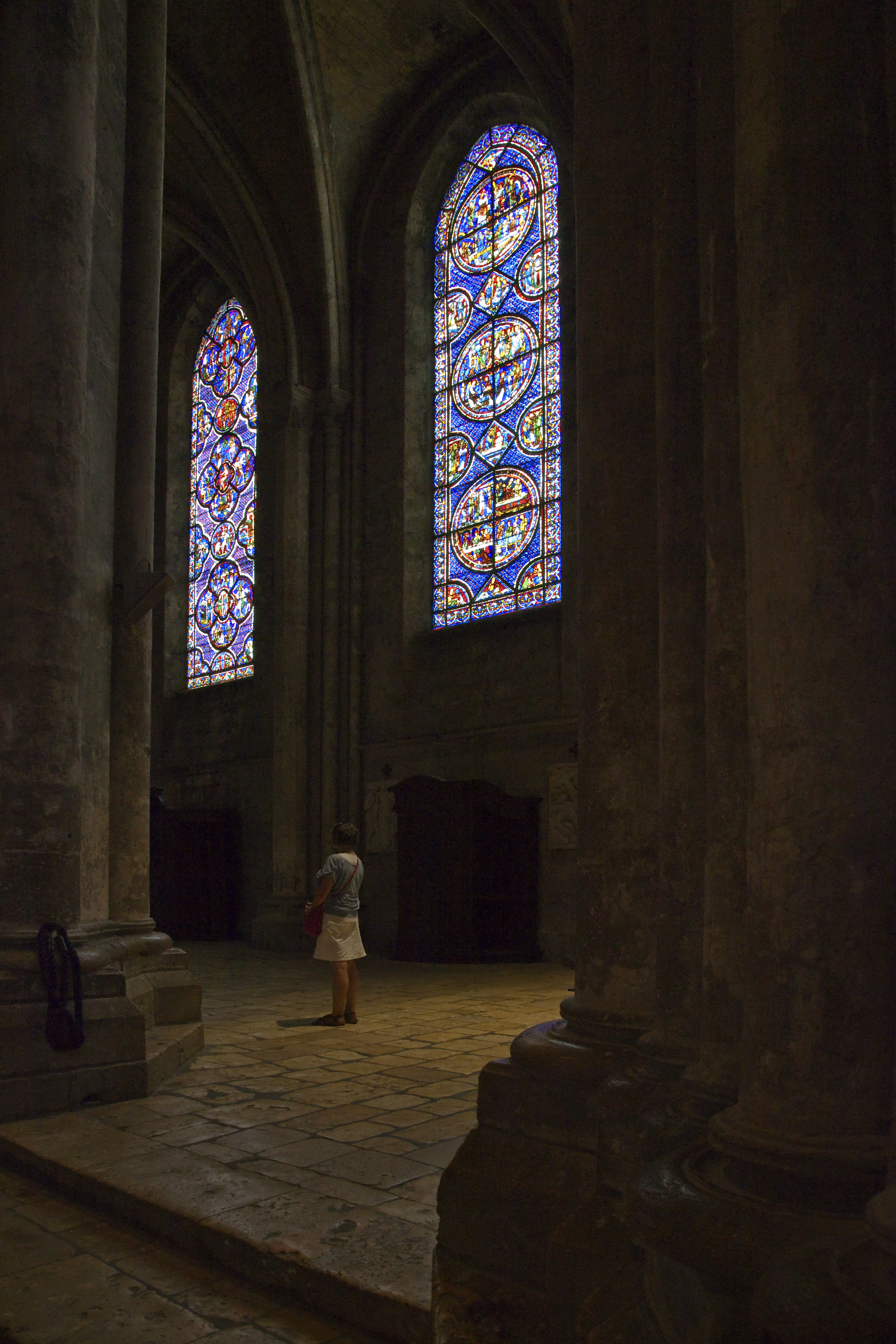 Chartres, Seitenschiff mit Fenstern